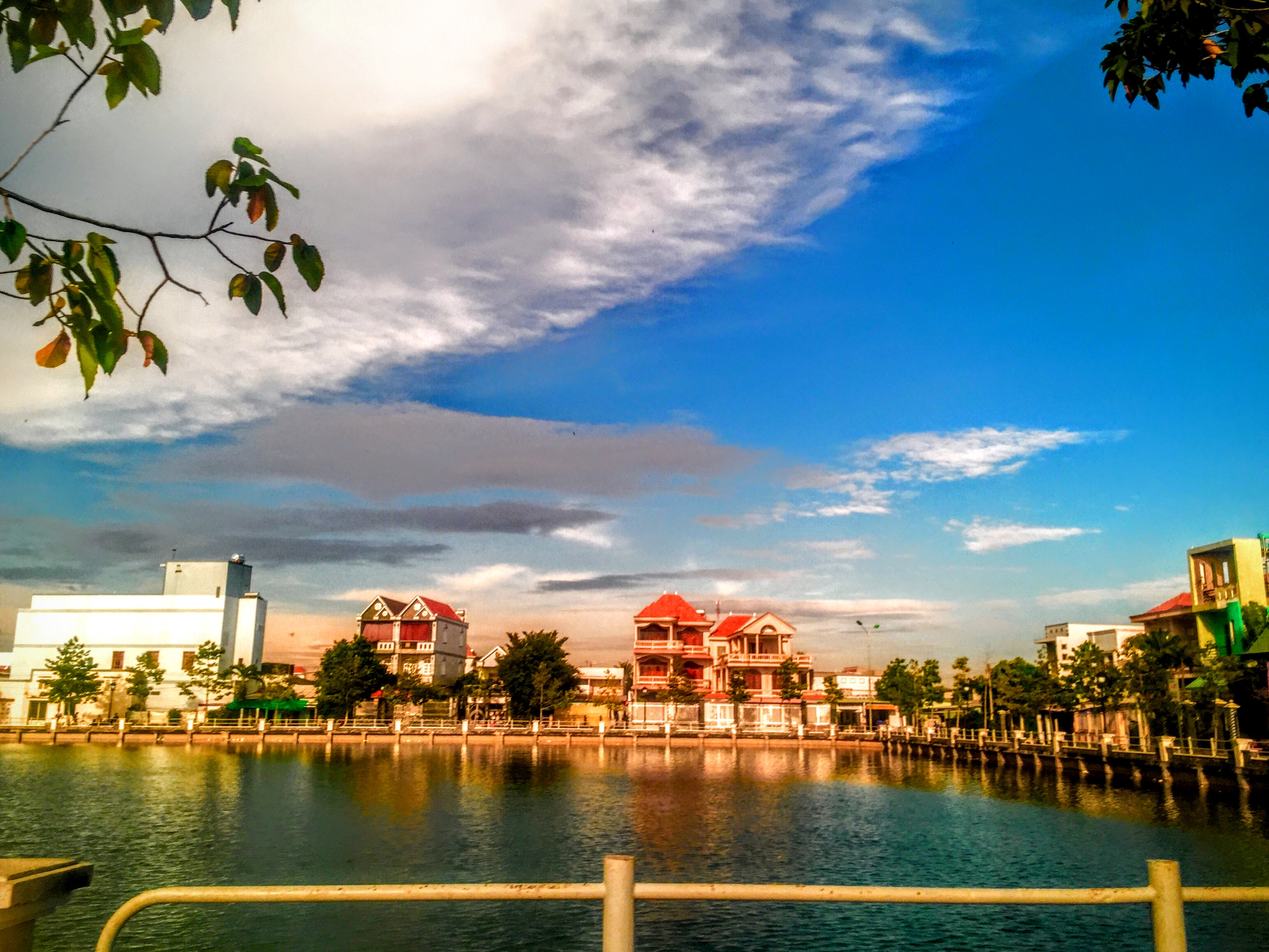 phường 2, tx. Gò Công, Tiền Giang, Vietnam